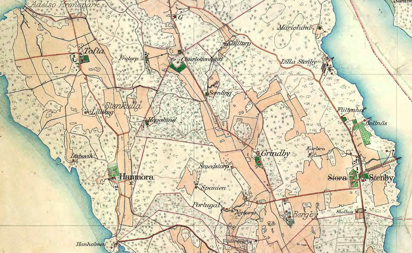 Gårdarna Tofta, Hanmora, Stenby, Grindby m fl på Adelsön